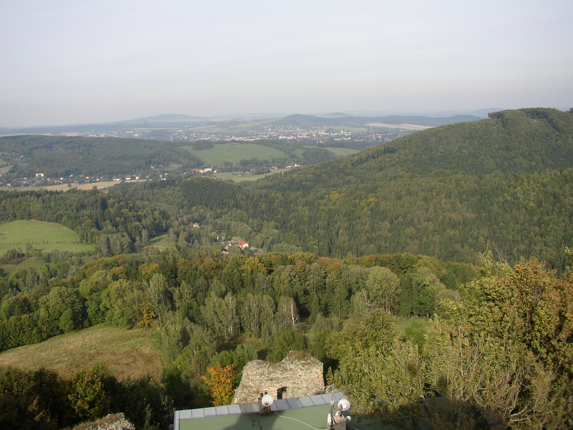 Pohled z Tolštejna na Varnsdorf